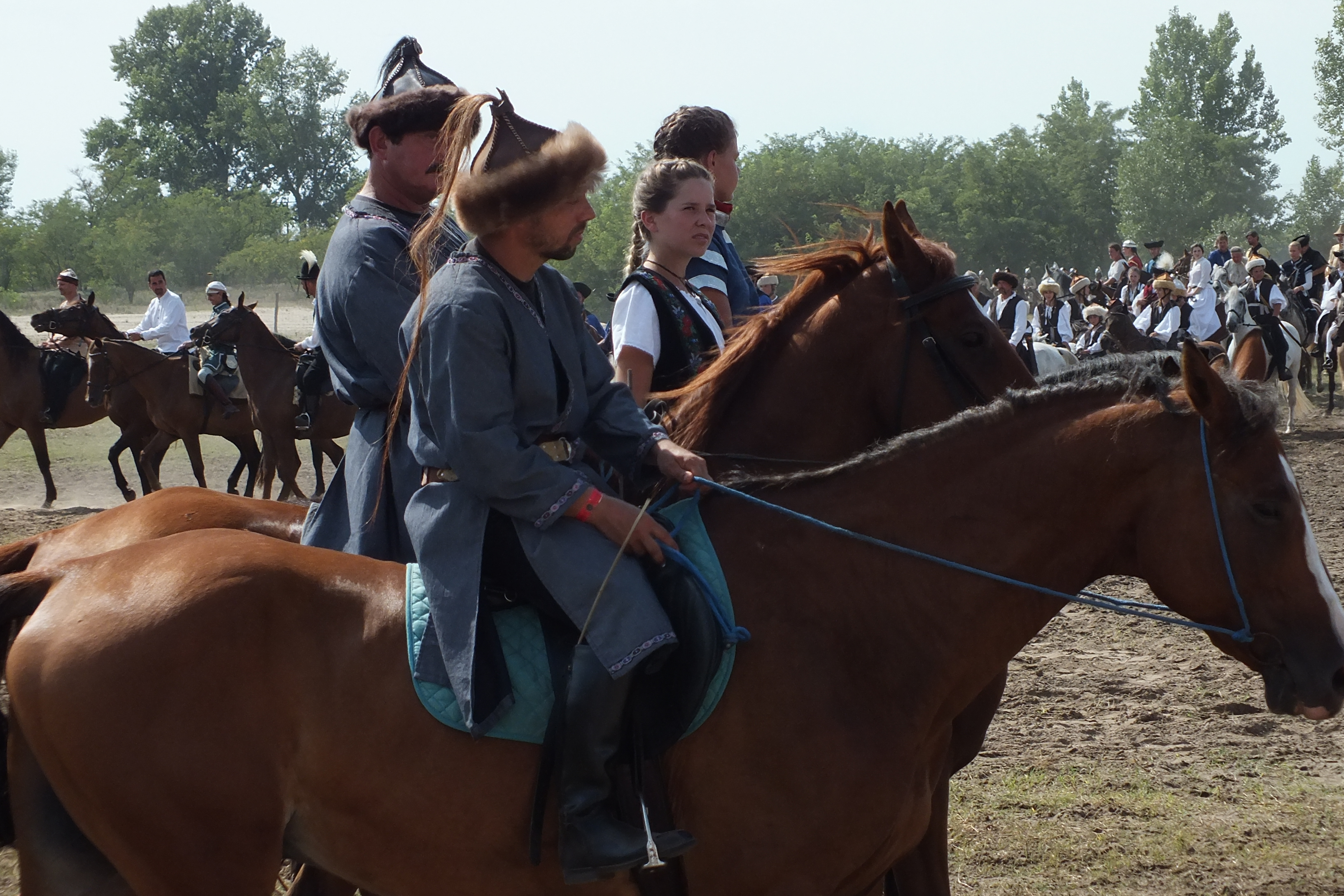 вершники на арені під час Курултаю. Угорщина 2018 рік